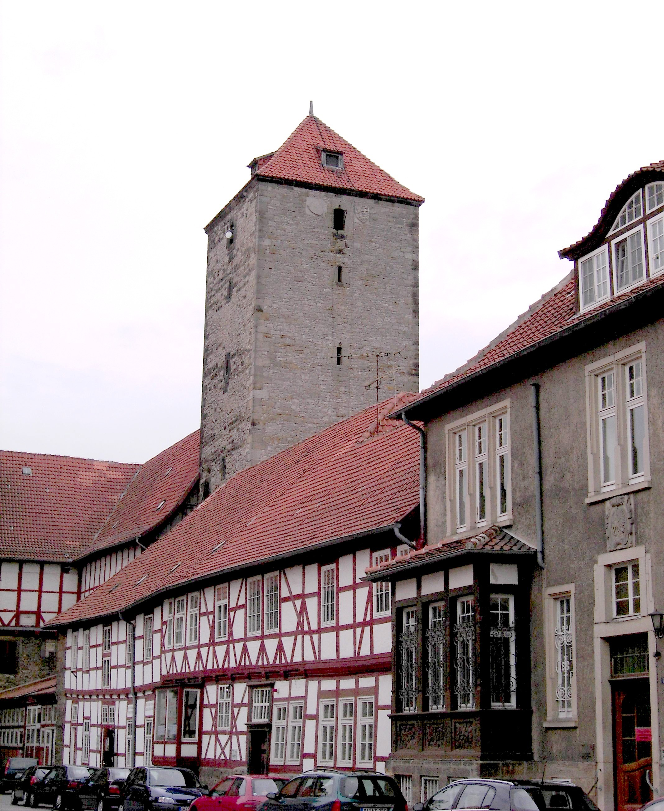 Hildesheim, Marienburg